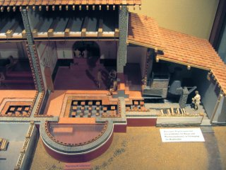 Modell eines römischen Badehauses mit Fussbodenheizung (Römerkastell Saalburg)